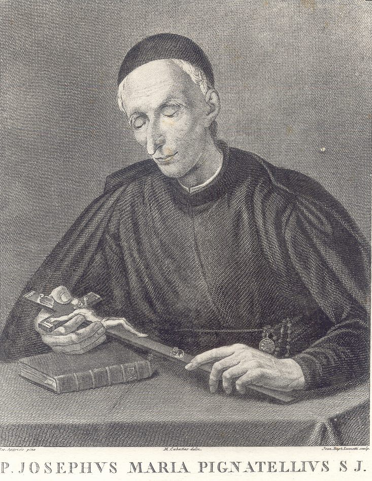 Saint Joseph Pignatelli, restaurateur de la Compagnie de Jésus en Italie (1737-1811)